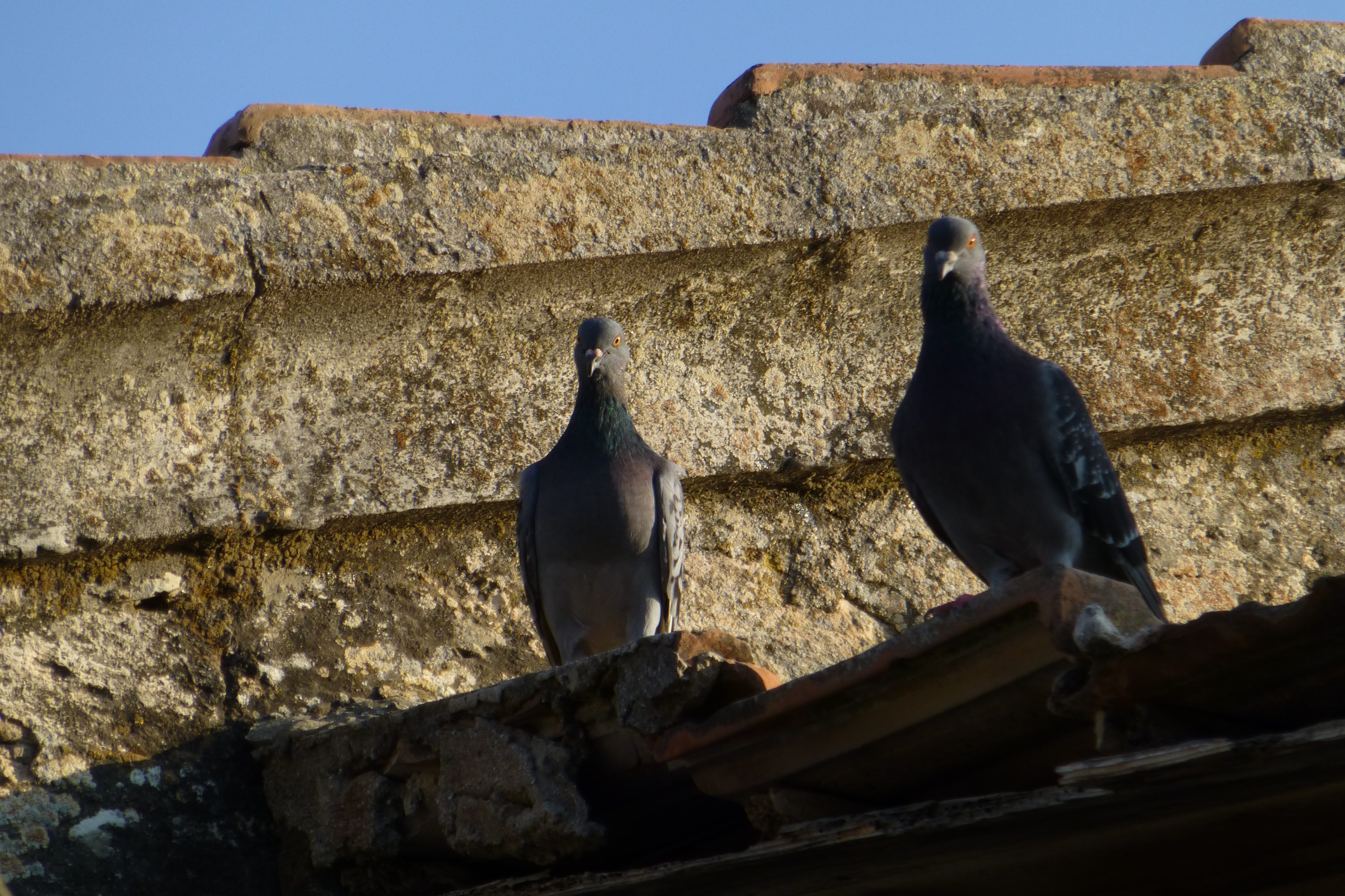 ראשוני המתיישבים באתר היישוב אלוני אבא היו בני הדור השני של תנועת הטמפלרים הגרמנים, אשר הקימו במקום בשנת 1907 מושבה חקלאית קטנה ושמה "ולדהיים".